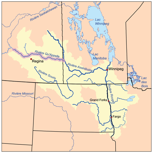 Version française de cette carte: Quappellerivermap.png.